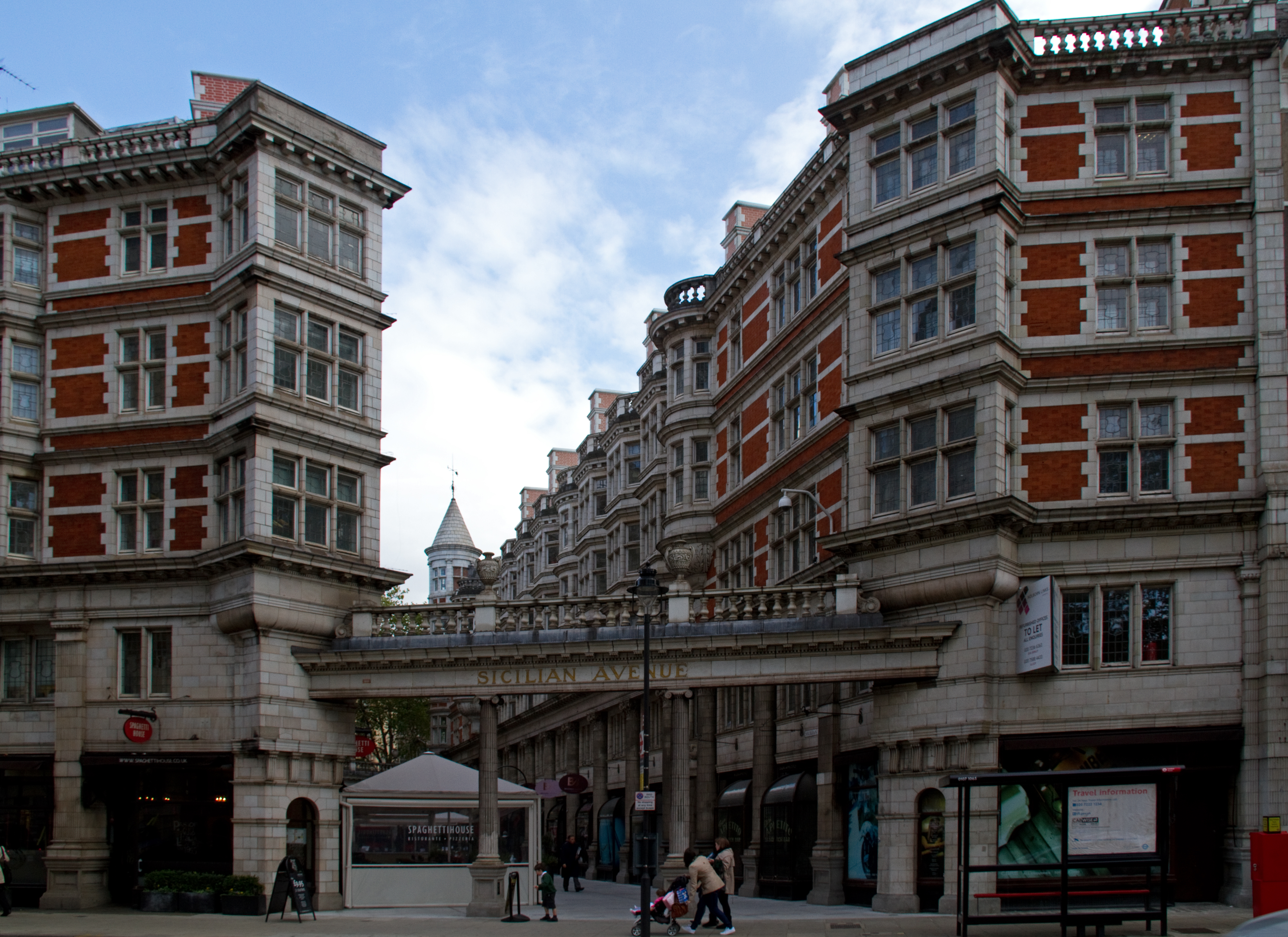 Sicilian Avenue 1